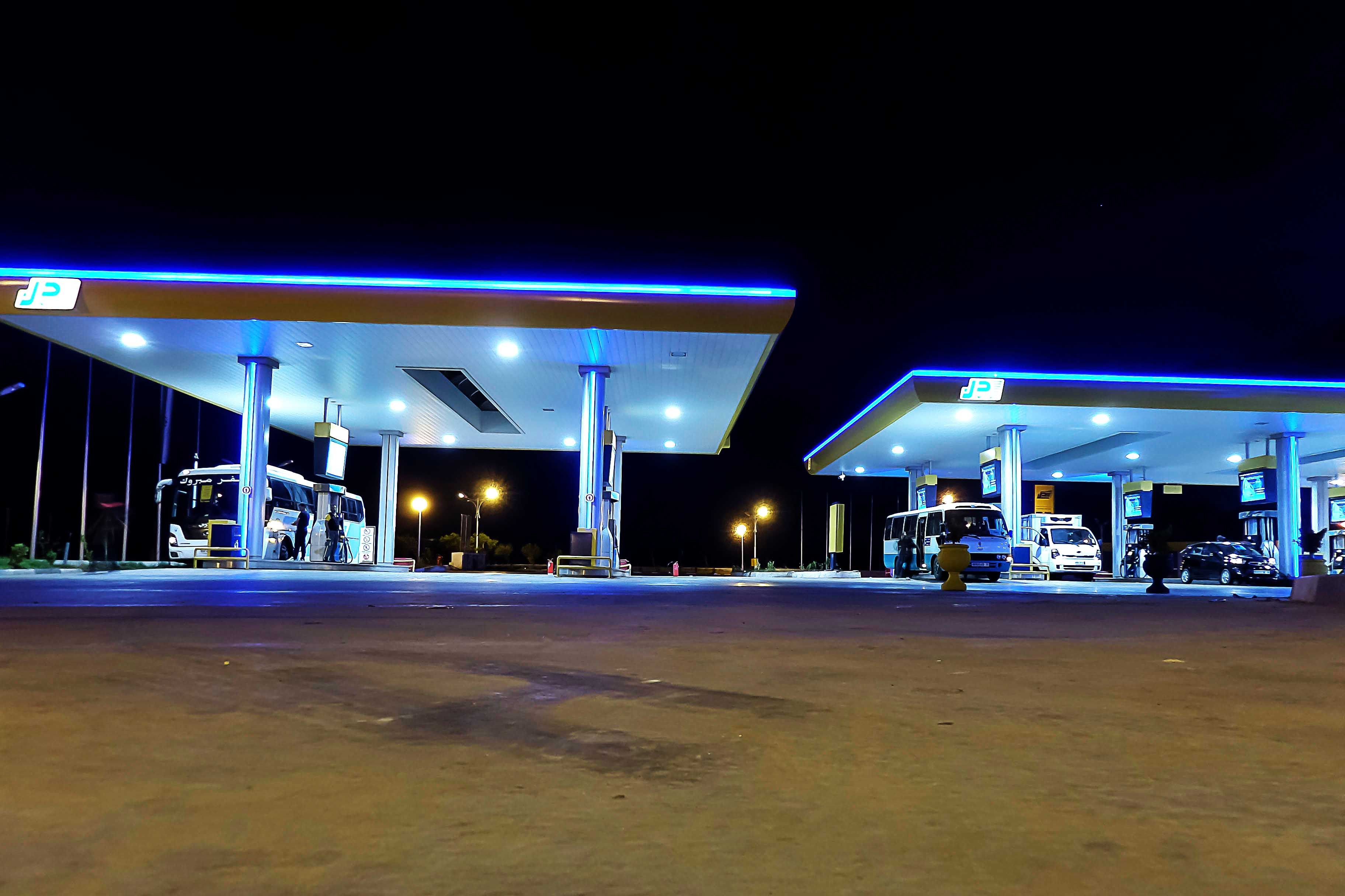 Station Sidi Yacoub محطة سيدي يعقوب